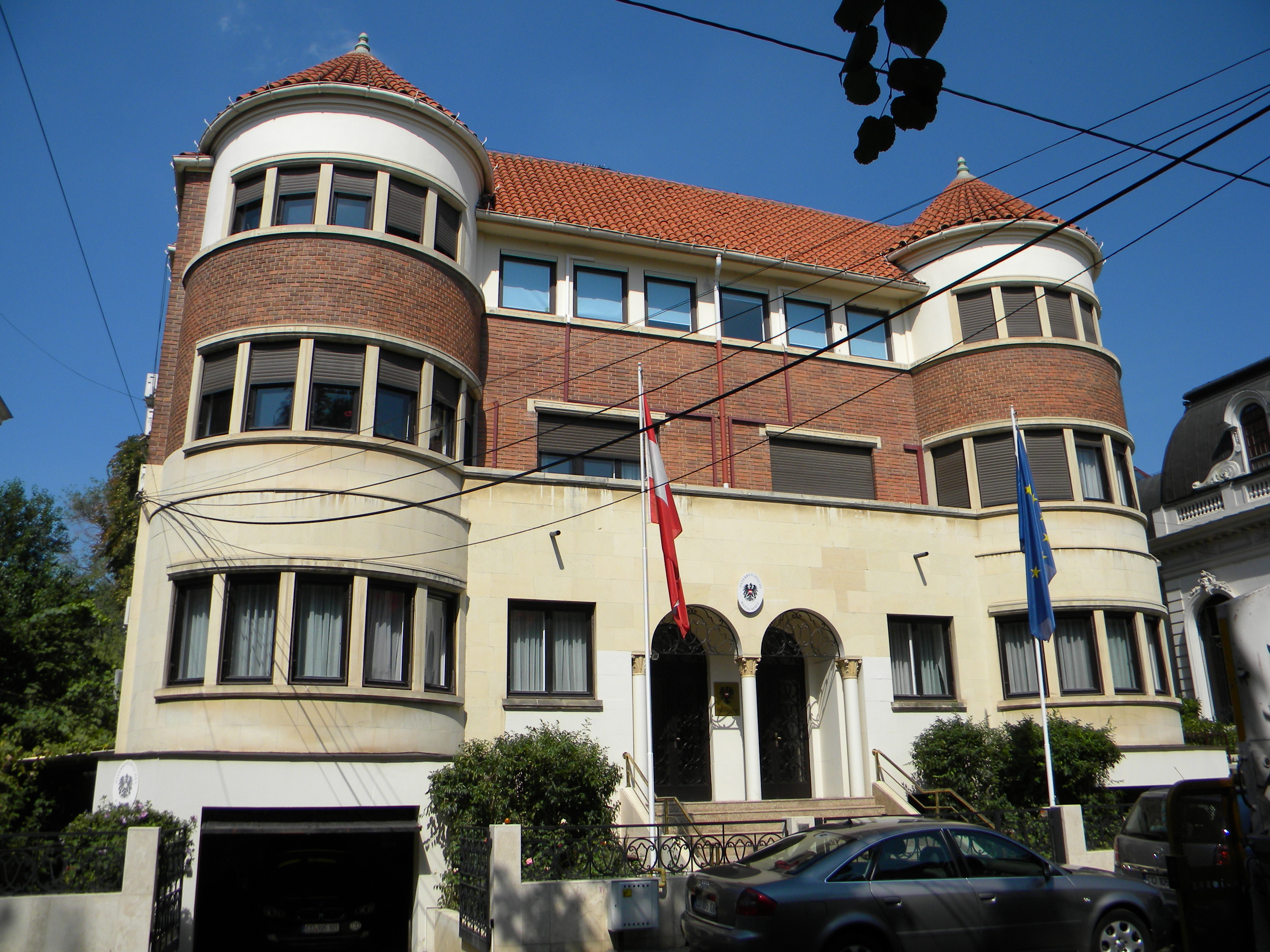 Casa pe Str. Dumbrava Rosie nr. 7, Bucuresti sect. 2 (fatada)